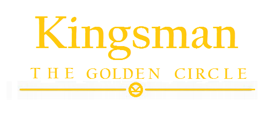 Logo original du film Kingsman : Le Cercle d'or coécrite et réalisée par Matthew Vaughn, sortie en 2017.